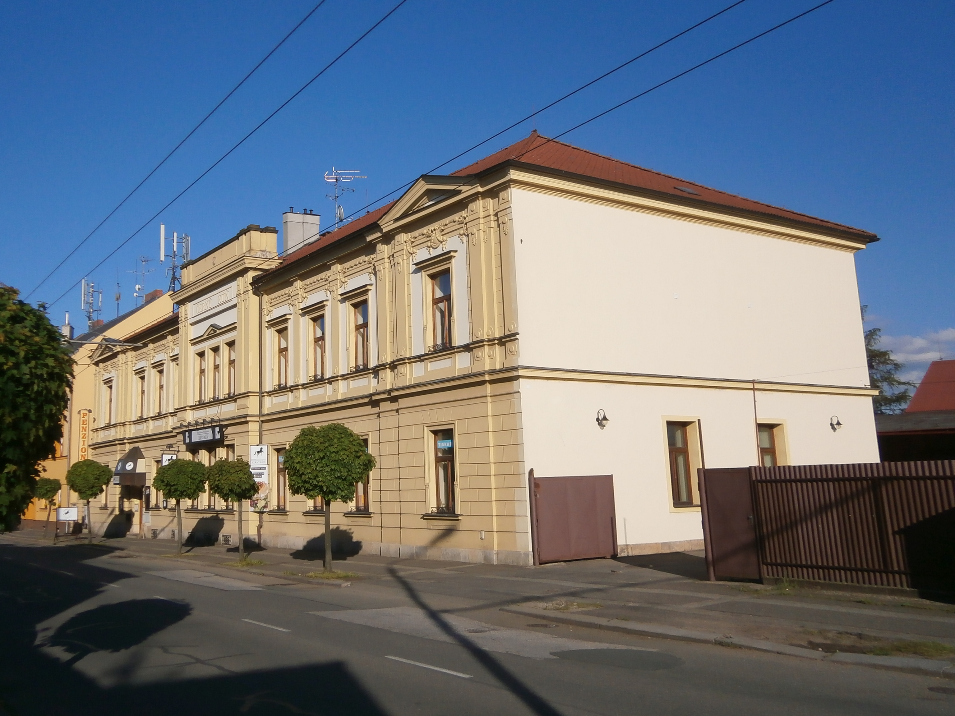 Penzion Černý kůň